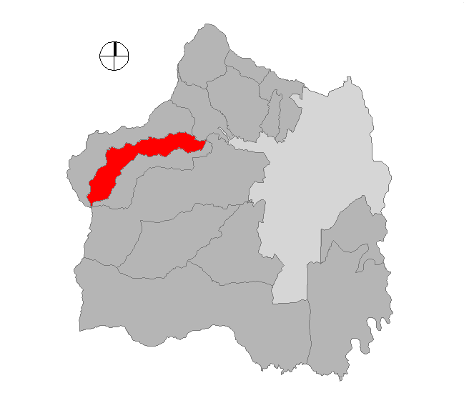 Corregimiento de Cali, Colombia